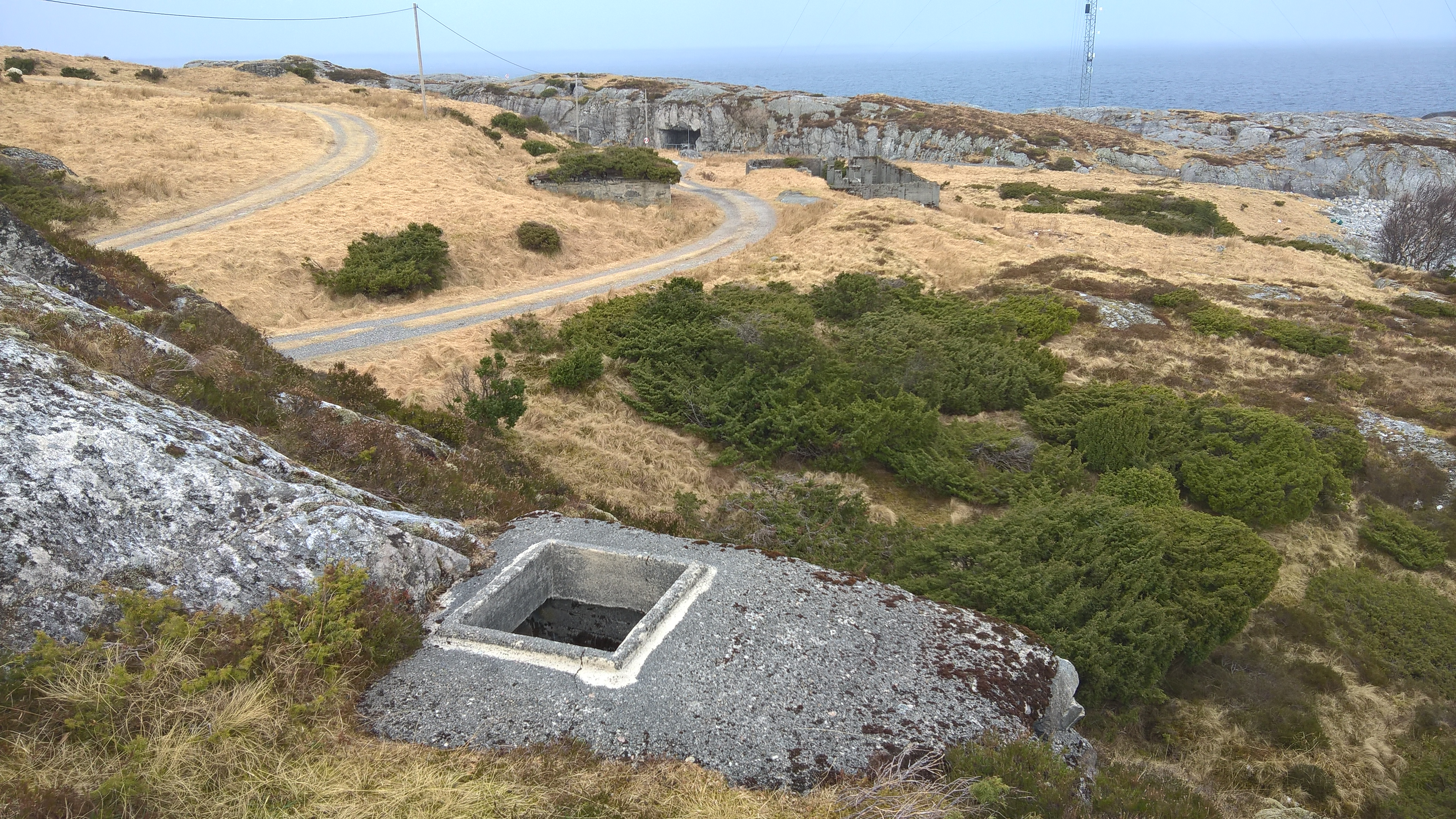 Tyske WW2 krigsbunkere på Kvitneset, Hareid Kommune